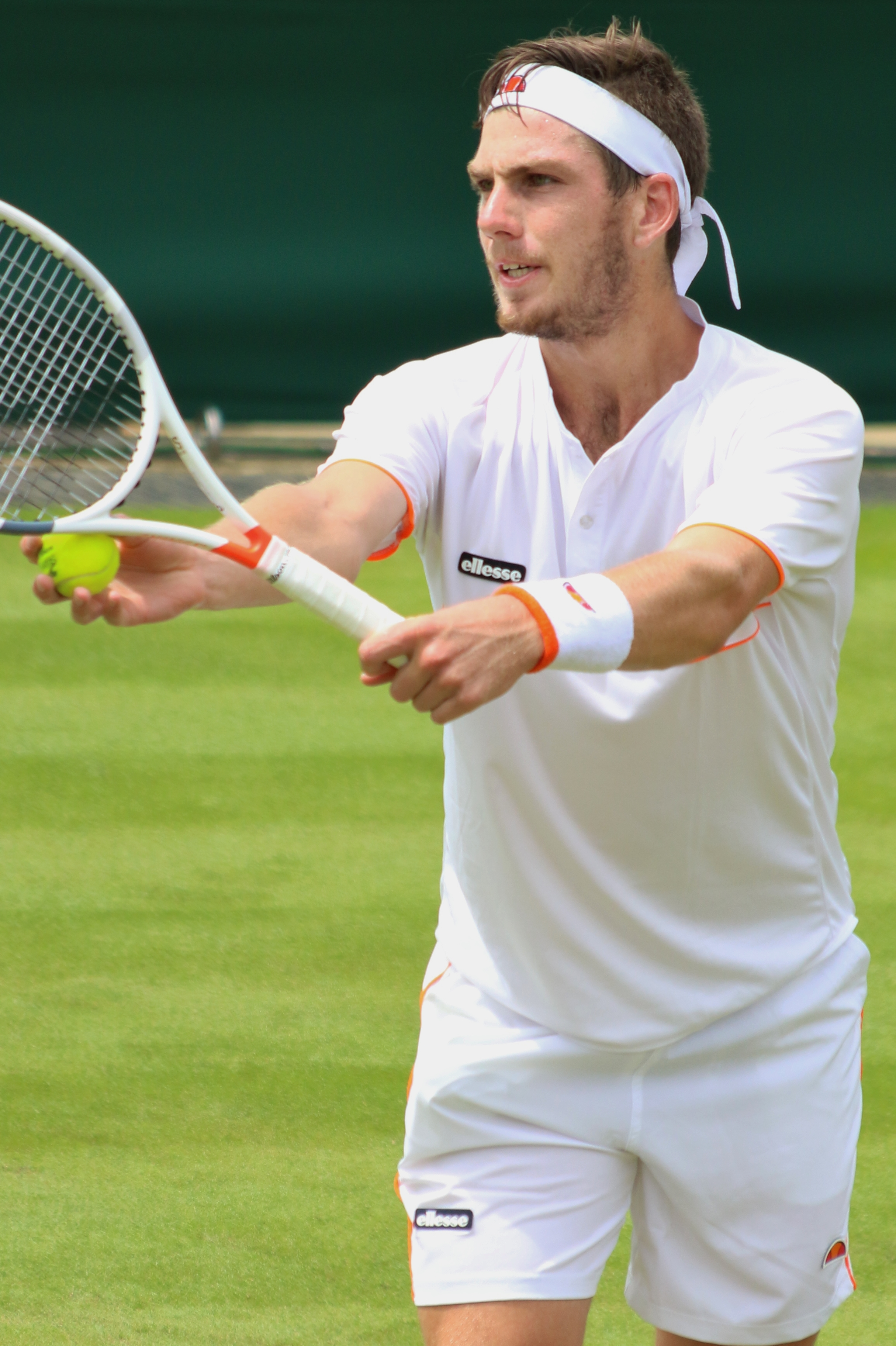 Norrie WM17 (2)